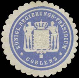 Sealing stamp Title: K. Regierungs-Präsidium Koblenz Description: Coblenz, blau, weiß, geprägt Place: Koblenz size: 4 cm